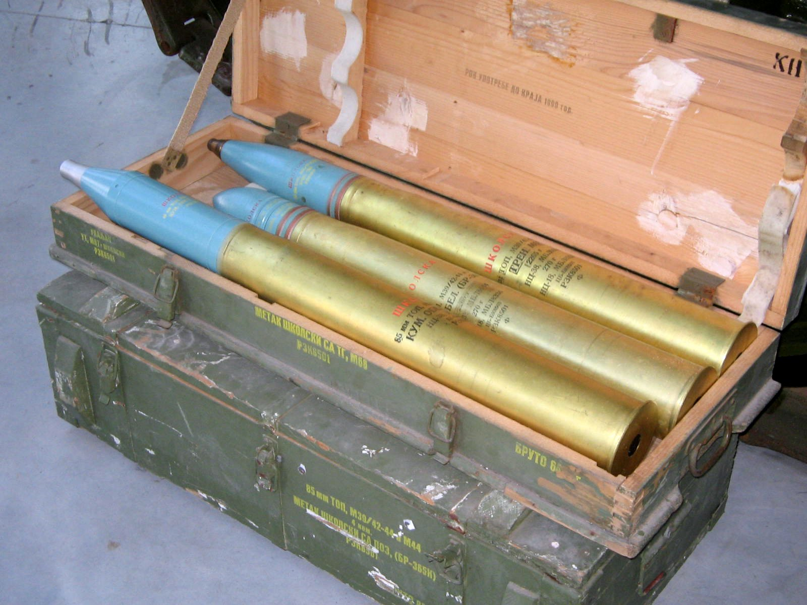 Park of Military History, Pivka, Slovenija